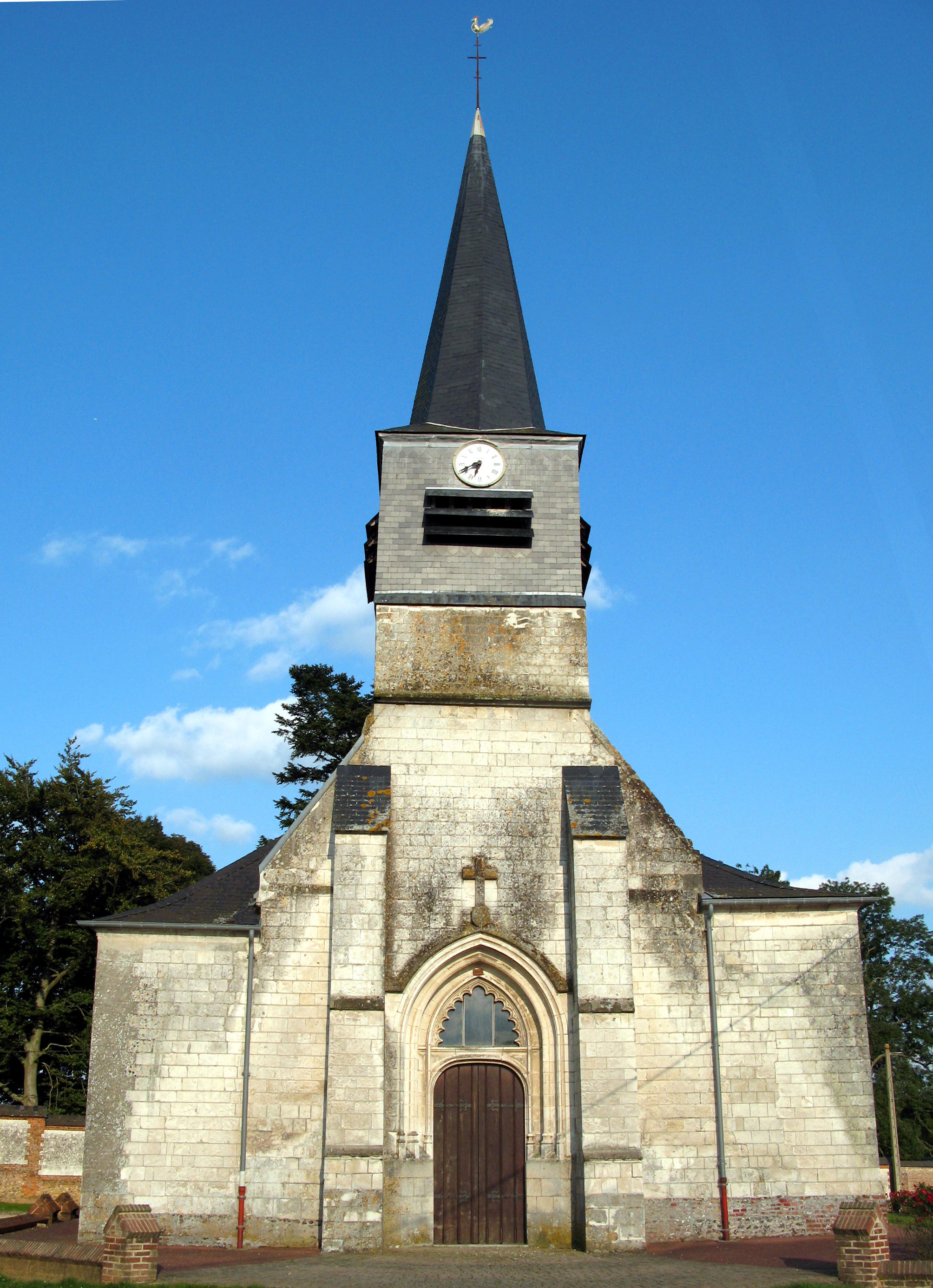 Mérélessart (Somme, France) - L'église.